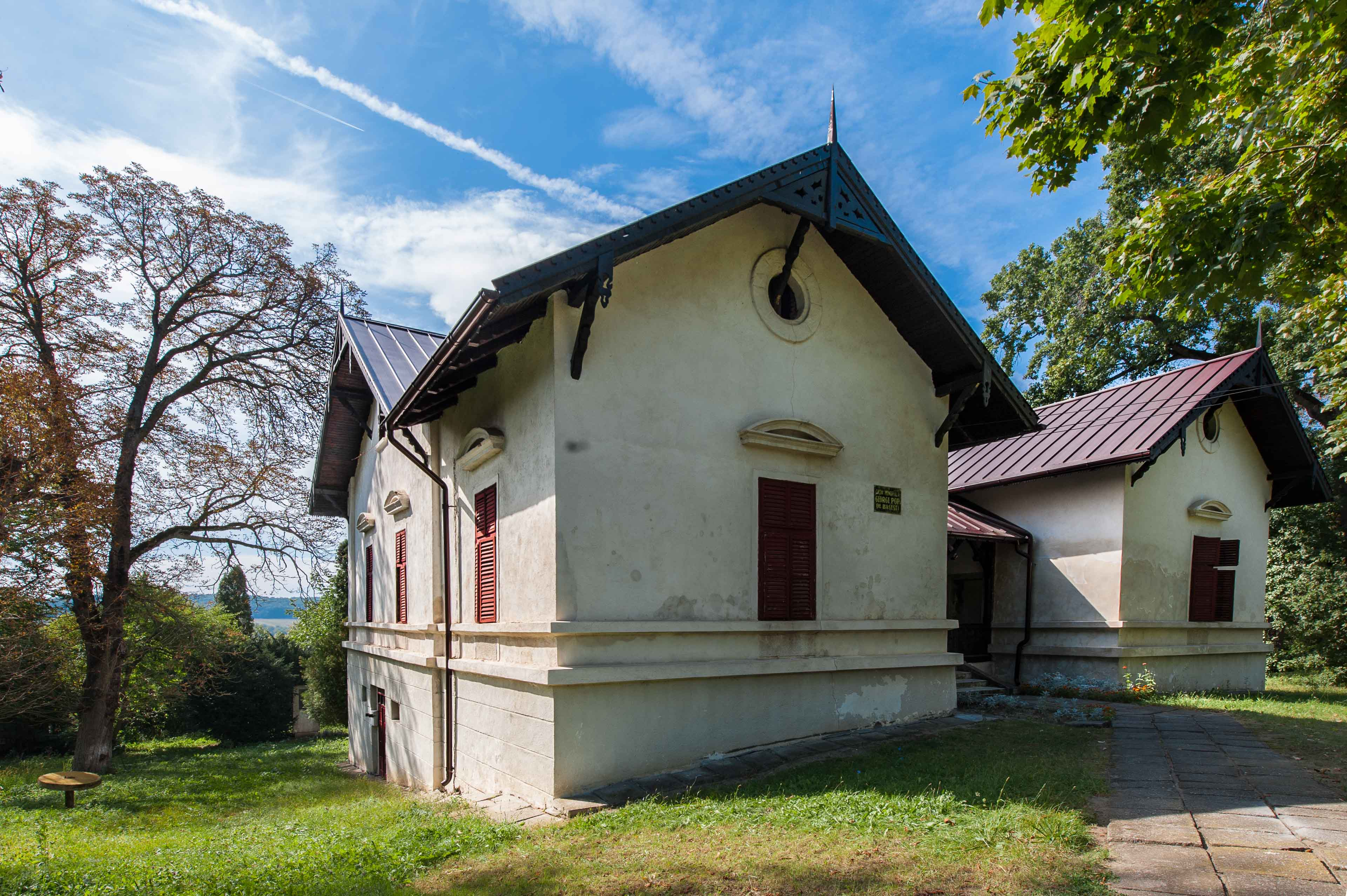 Casa Gheorghe Pop de Băsești